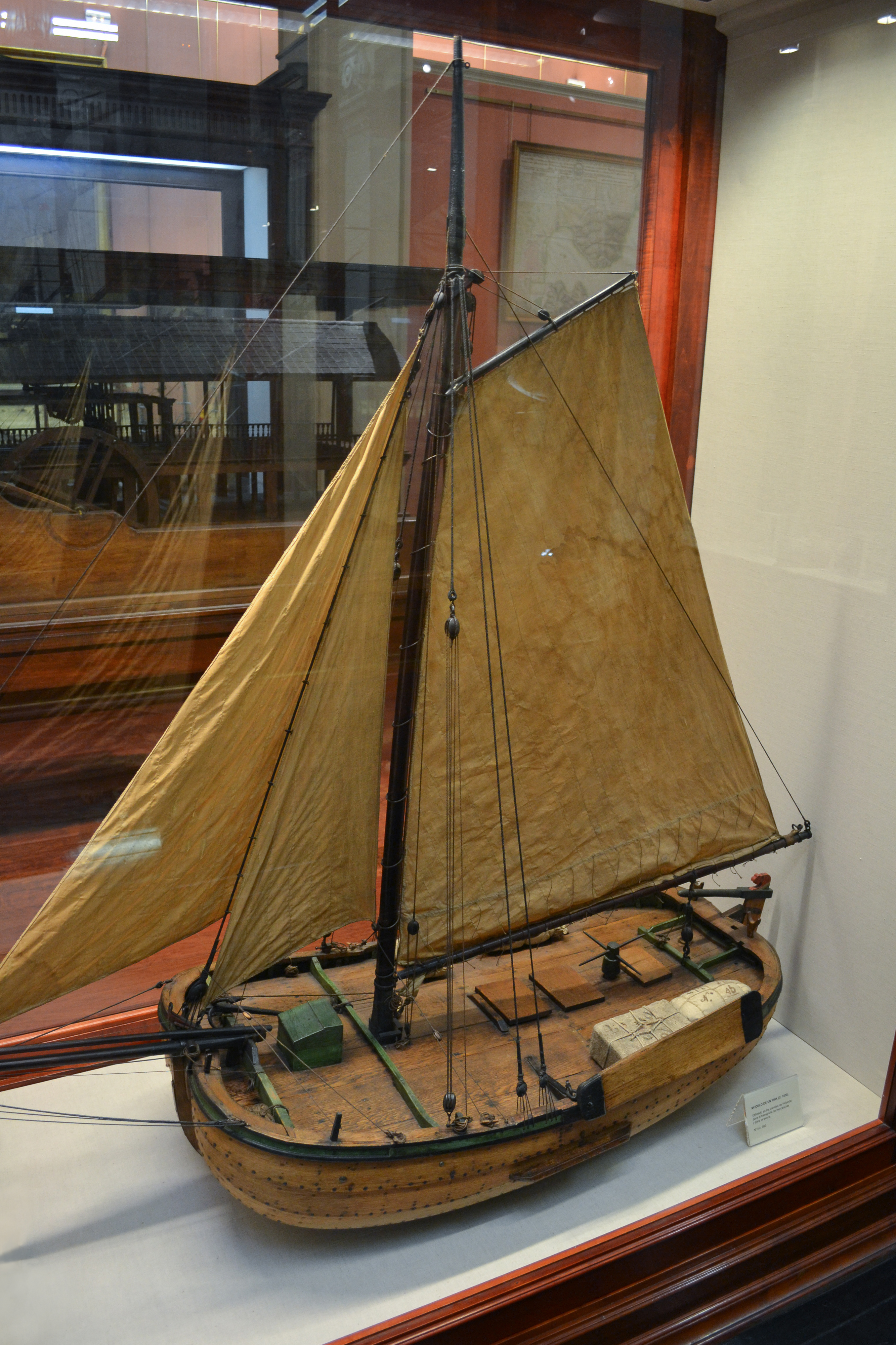 Modelo de un Pink o Pingue (c. 1870). Museo Naval de Madrid. Nº inv. 993.